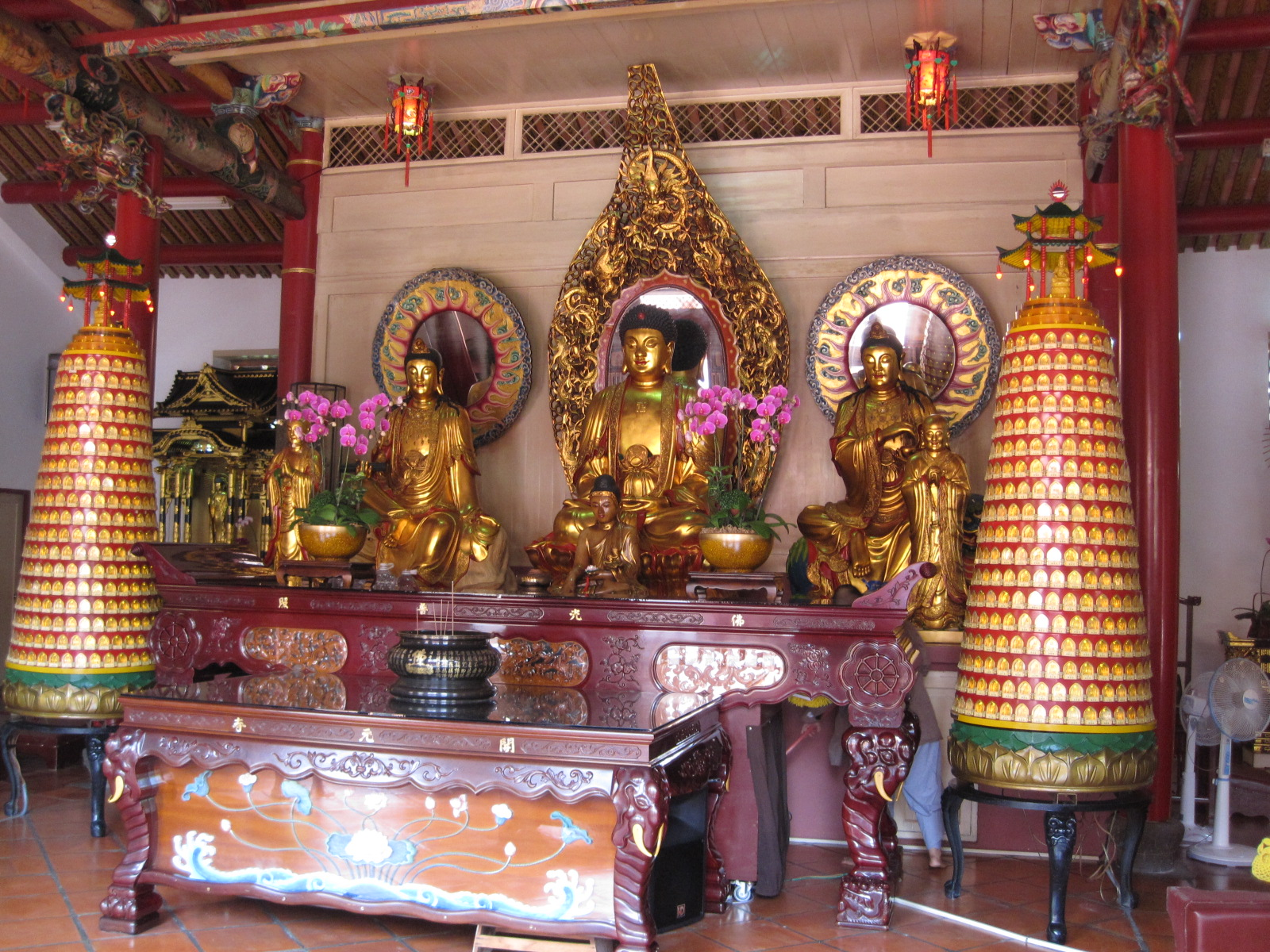 臺南開元寺大雄寶殿佛像